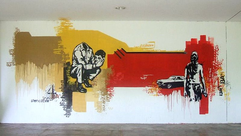 Grafite de Daniel Melim, na parte externa do Museu Afro Brasil, no Parque do Ibirapuera, em São Paulo.